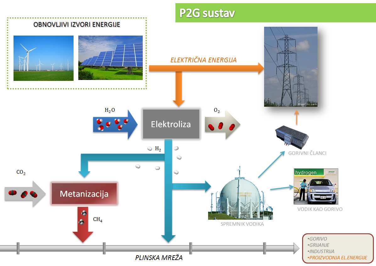 Shematski prikaz Power to gas sustava